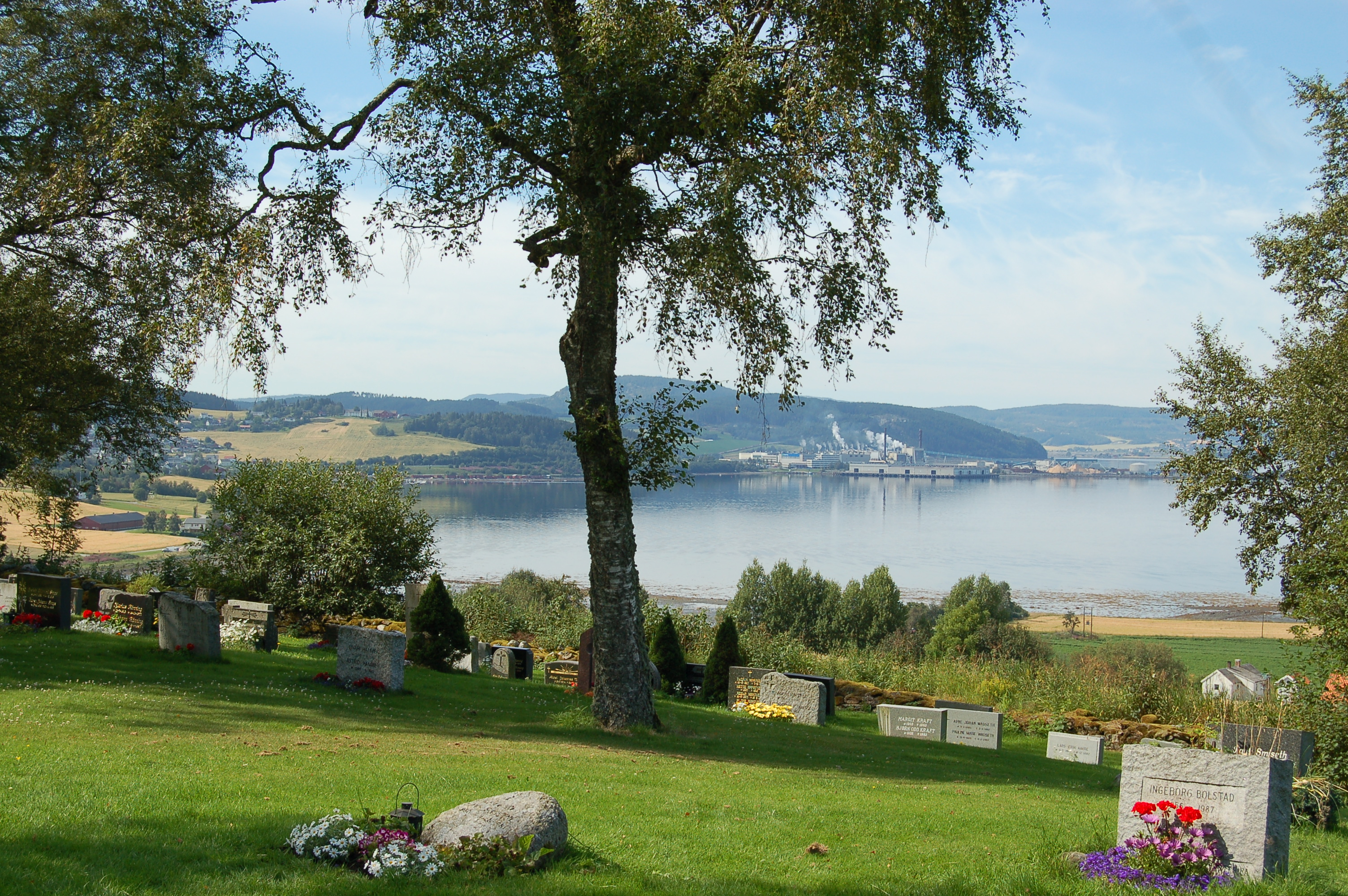 Utsikt fra Alstadhaug kirkegård mot Norske Skog.